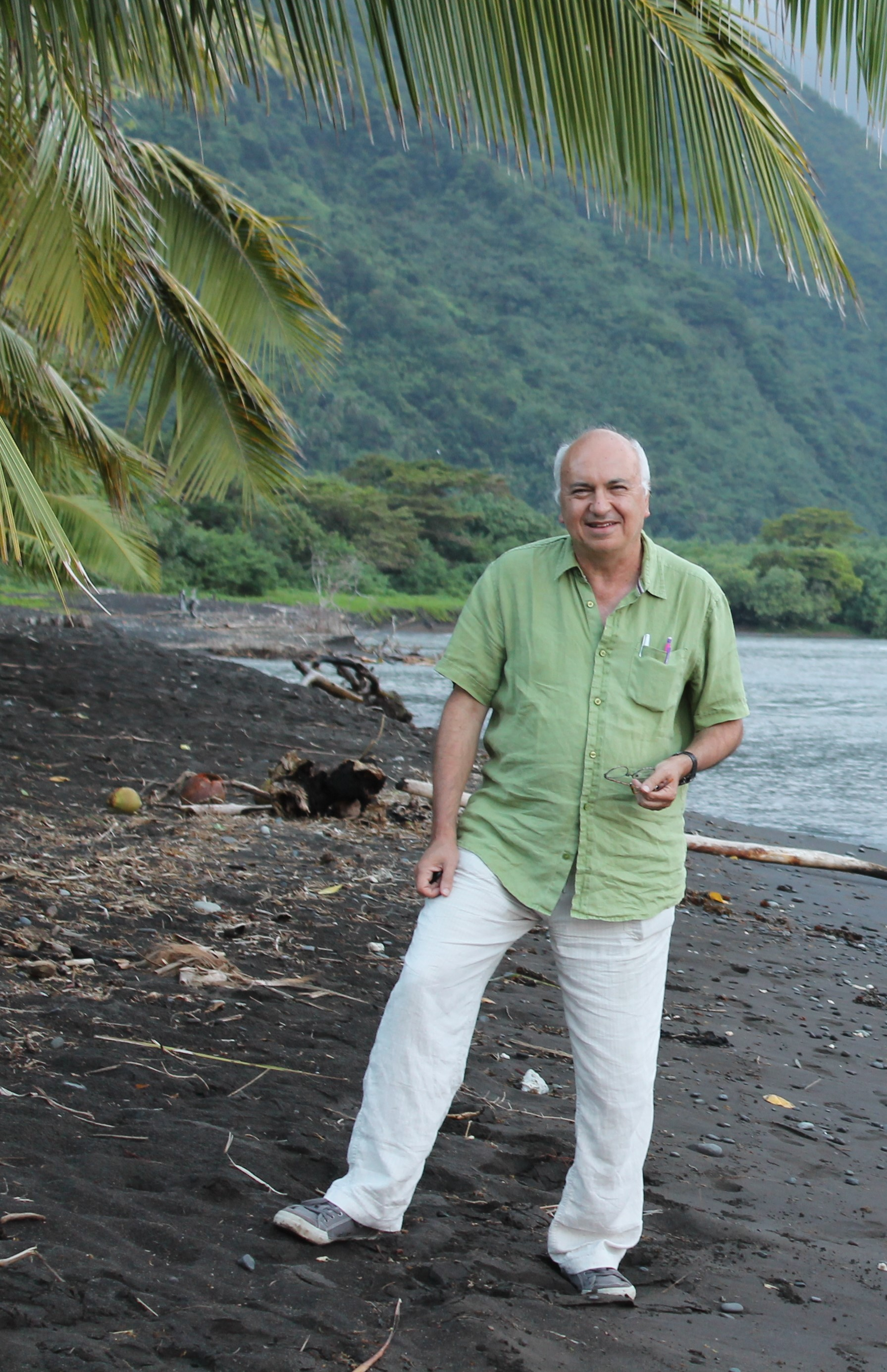 David Haziot à Tahiti en 2012